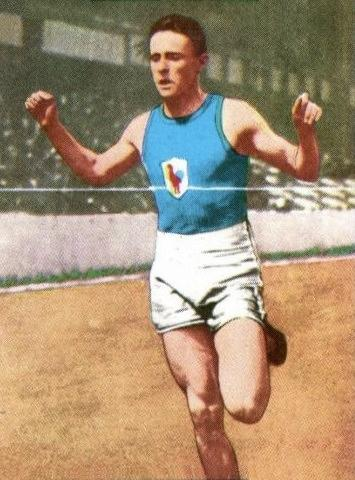 Joseph Guillemot vainqueur du 5000 mètres aux JO d'Anvers en 1920, 'Panini Olympia 1896 - 1972', Panini figurina n°62.